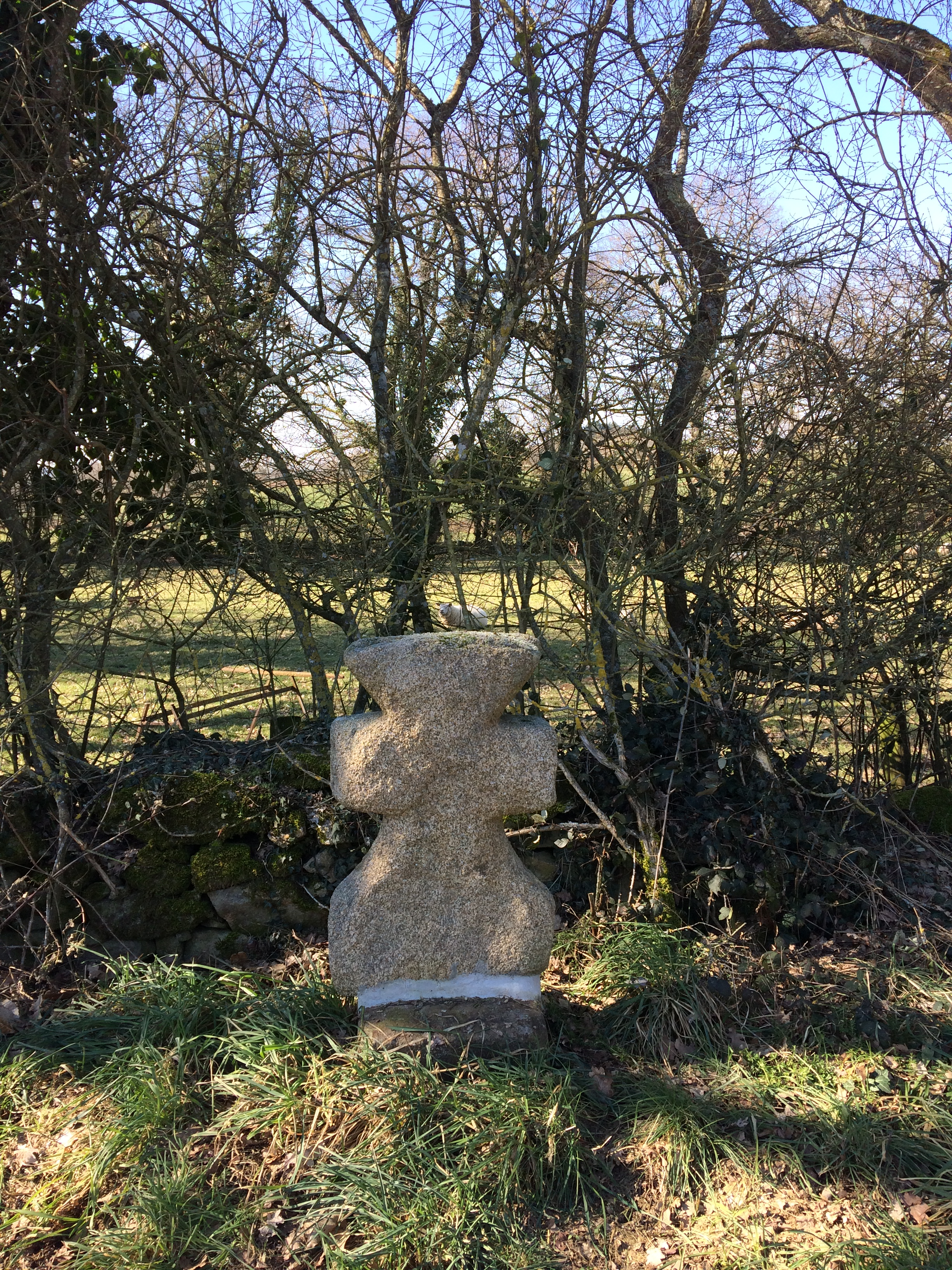 Croix pattée dite "de la Grande Côte" au Pré Carré à Crozant (Creuse)